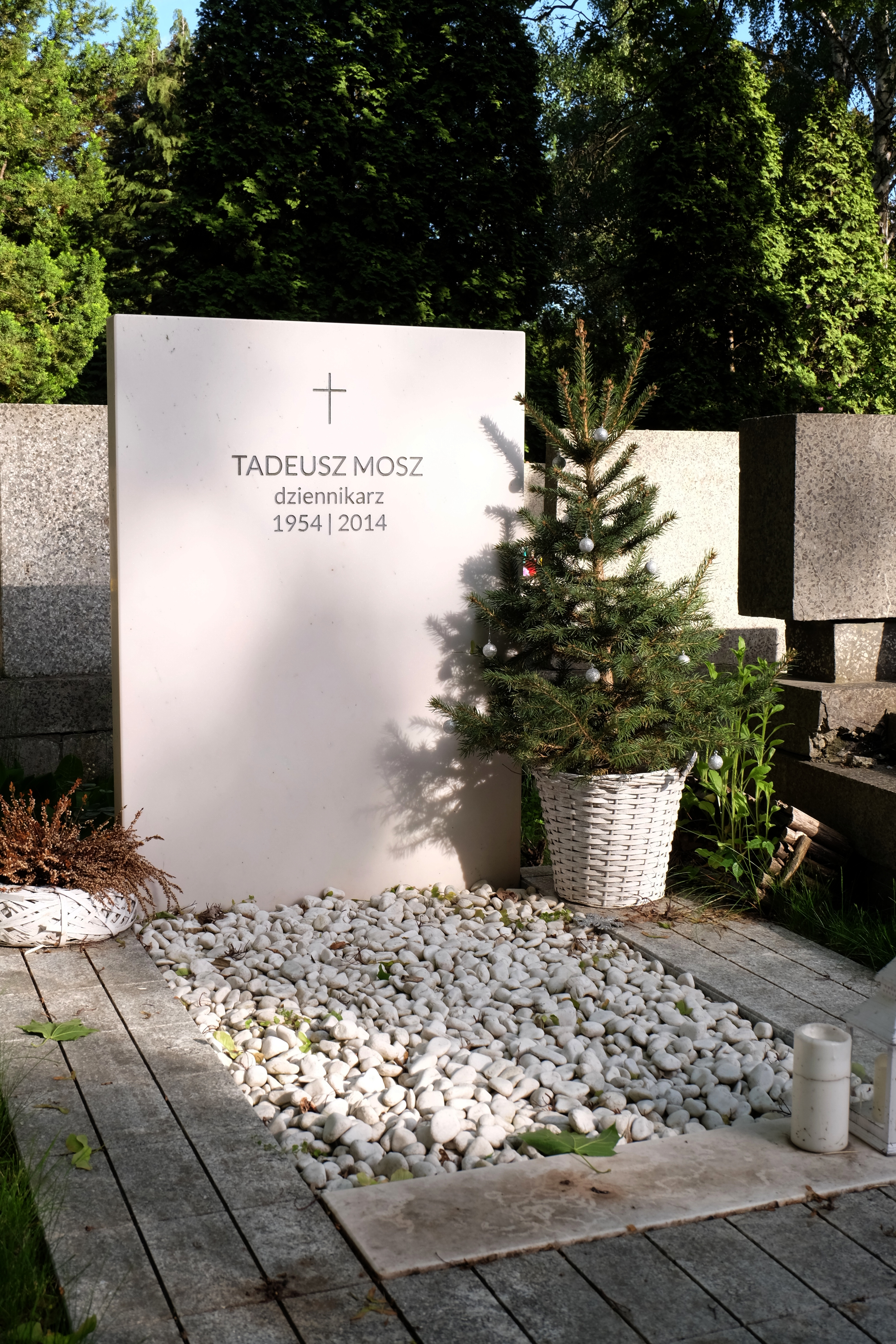 Grób dziennikarza Tadeusza Mosza na Cmentarzu Wojskowym na Powązkach w Warszawie